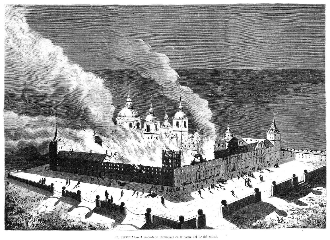 «El Escorial, el monasterio incendiado en la noche del 1º del actual», en la revista española La Ilustración Española y Americana.